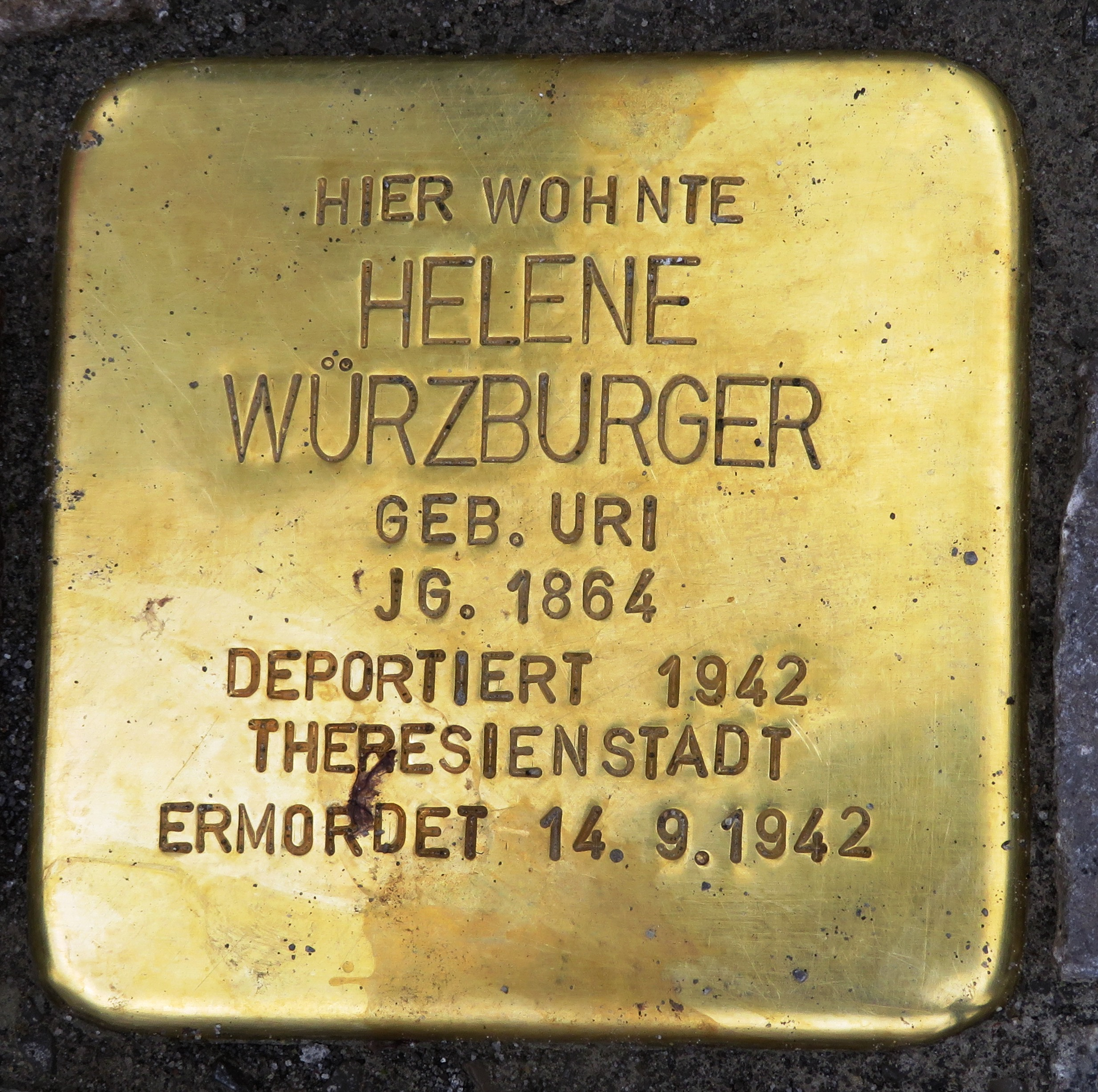 Stolperstein in Heilbronn